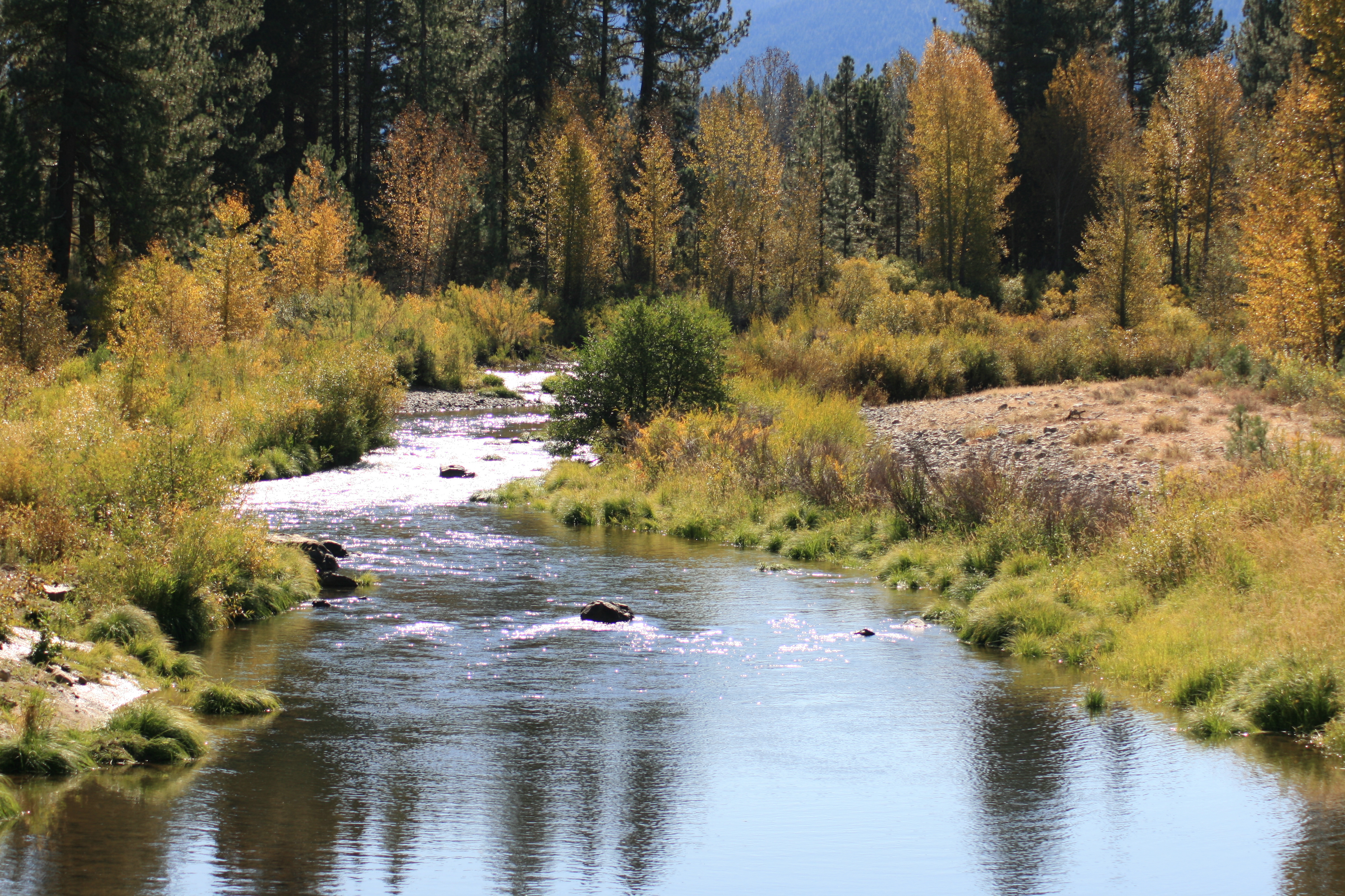 Blairsden Bridge- Middle Fork